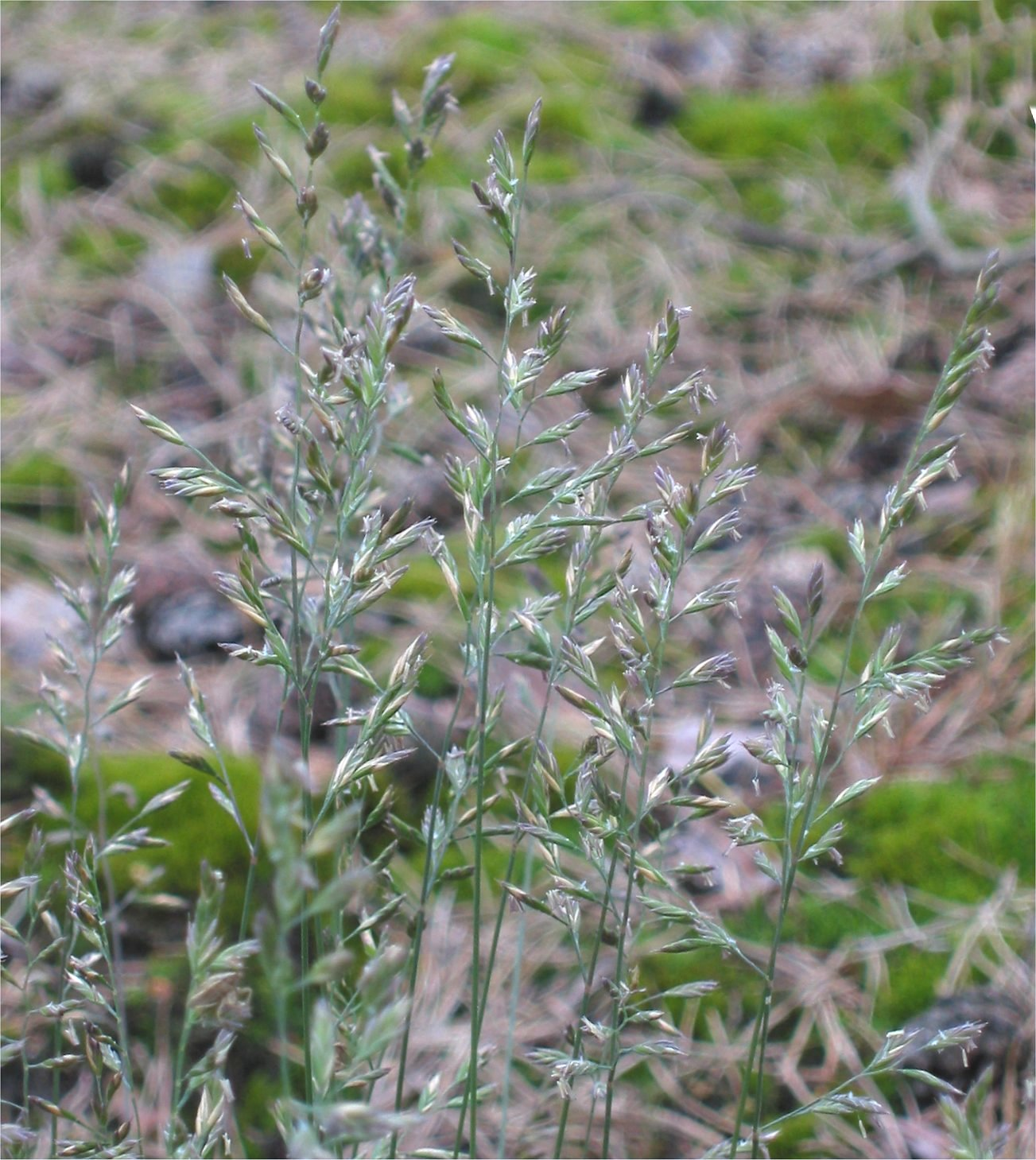 (nl: Ruig schapengras bloeiwijze) Festuca ovina subsp. hirtula